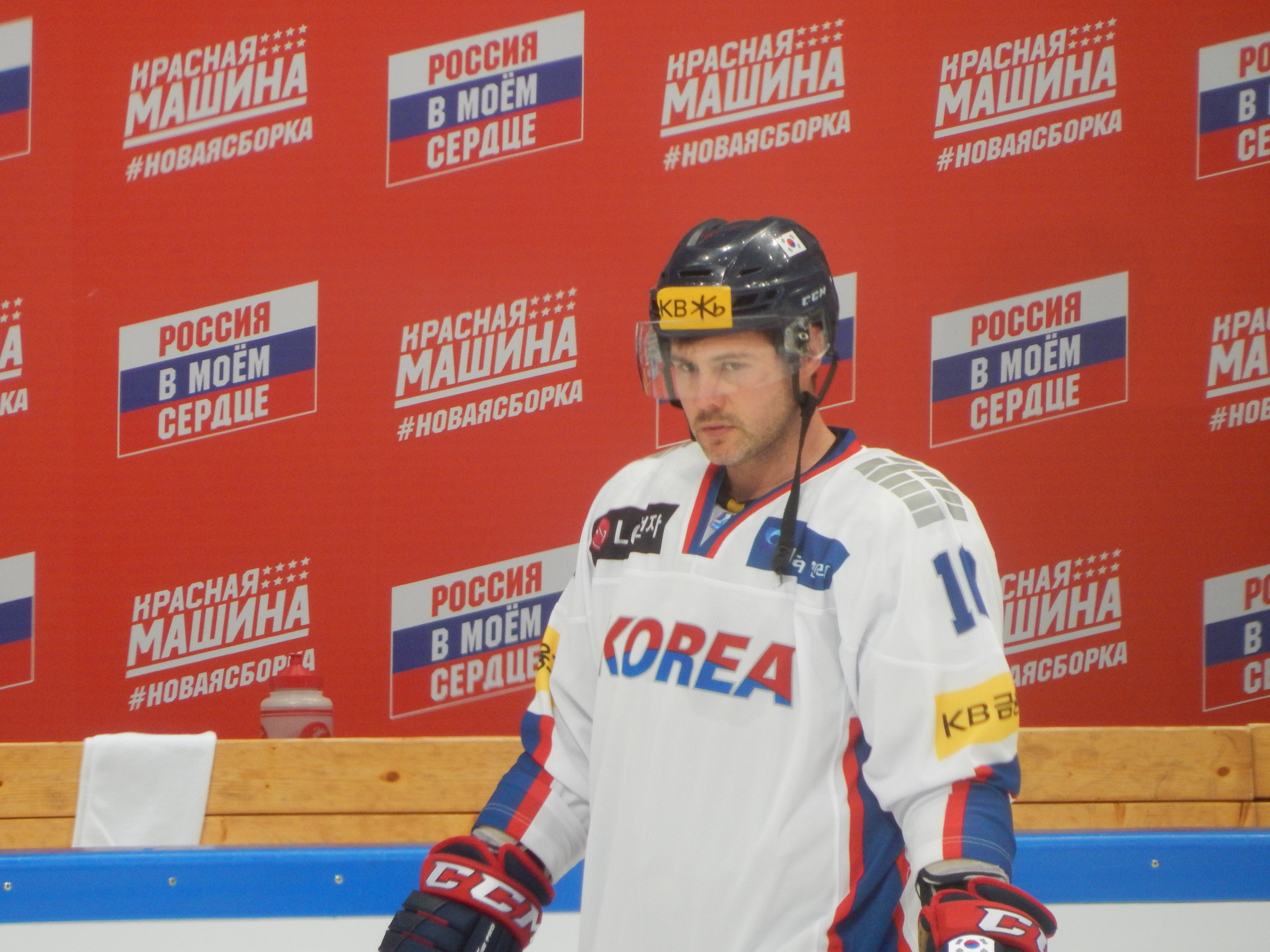 Кубок Первого Канала 2017, матч Канада - Южная Корея (13 декабря 2017) 10 SWIFT,Michael Owen (KOR)